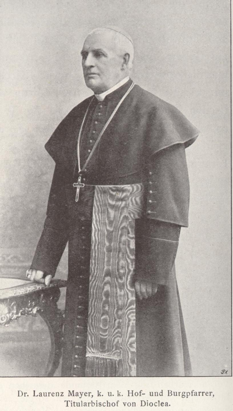 Bischof Laurenz Mayer, Wien, Hofburgpfarrer